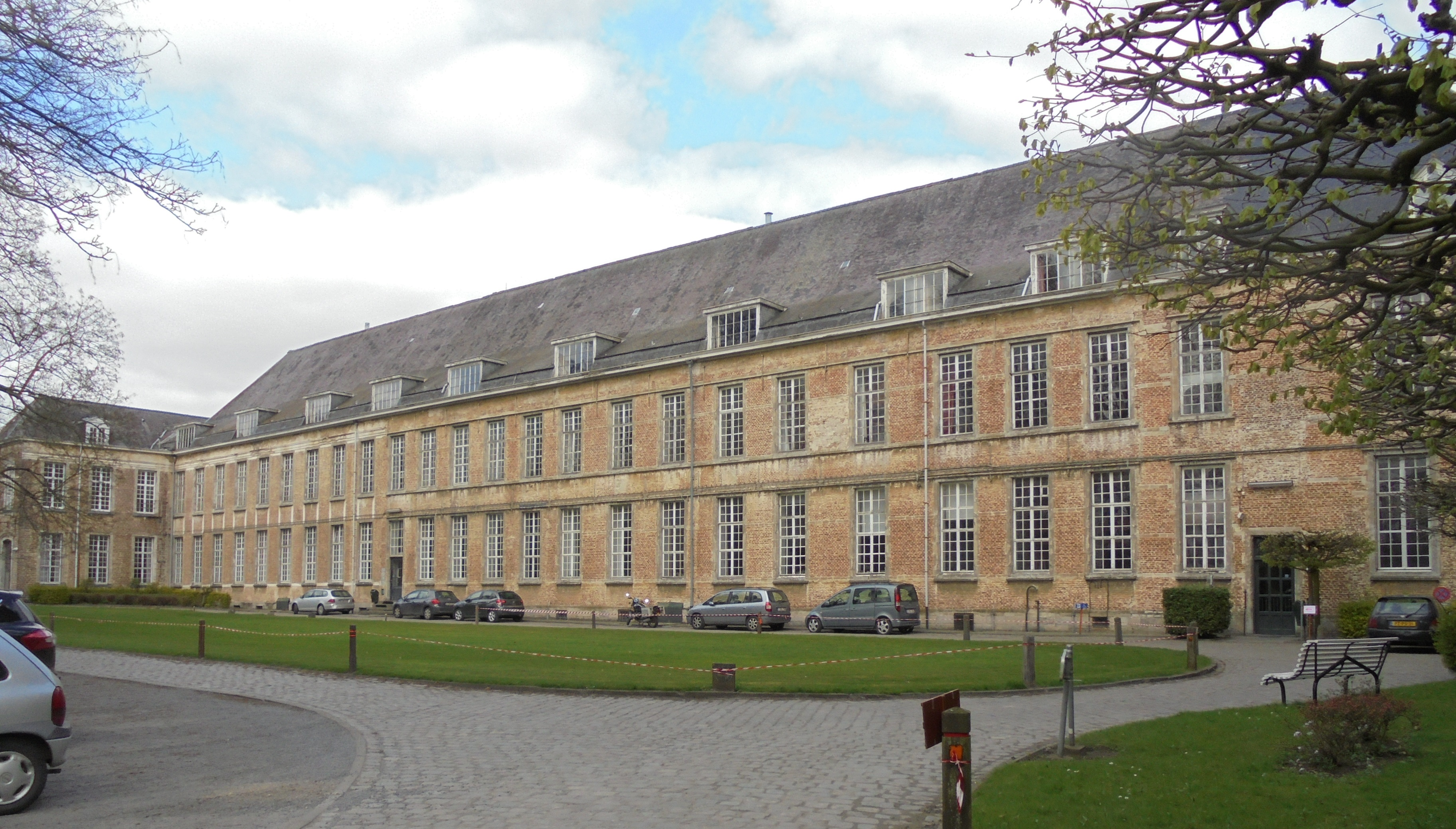 Abdij van Drongen - Drongenplein - Drongen - Gent - Oost-Vlaanderen - België